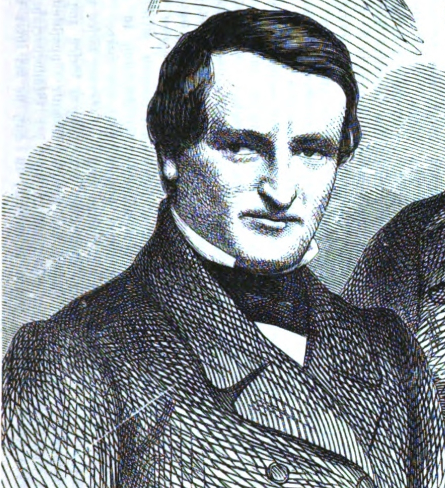 Ernst Friedrich Versmann, deutscher Theologe und Politiker im 19. Jh.